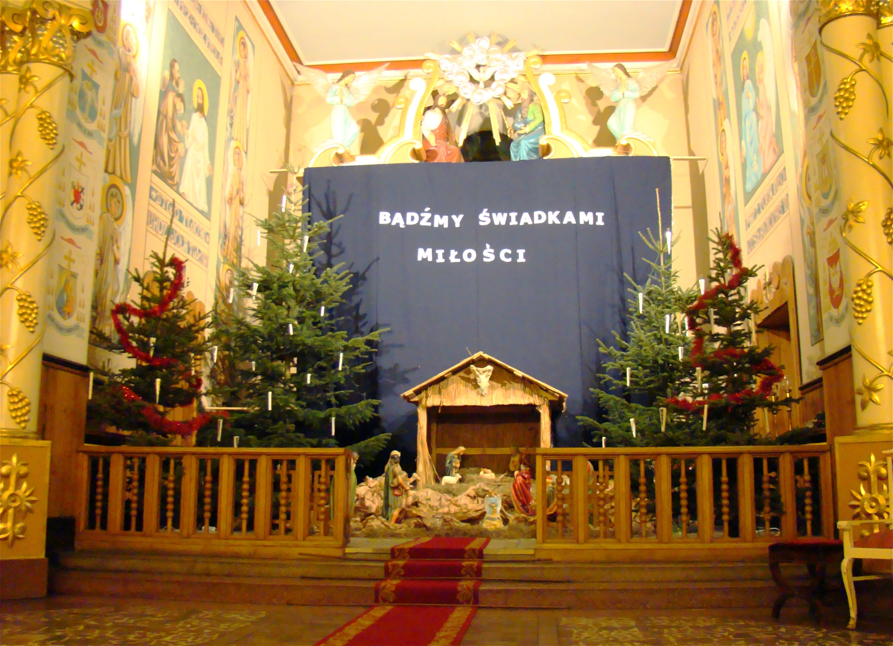 Szopka bożonarodzeniowa 2009 - Kościół pw. św. Rafała i Michała w Aleksandrowie Łódzkim (powiat zgierski, województwo łódzkie), Polska